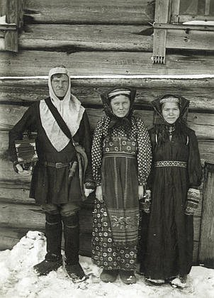 Открытка "Типы пермяков"